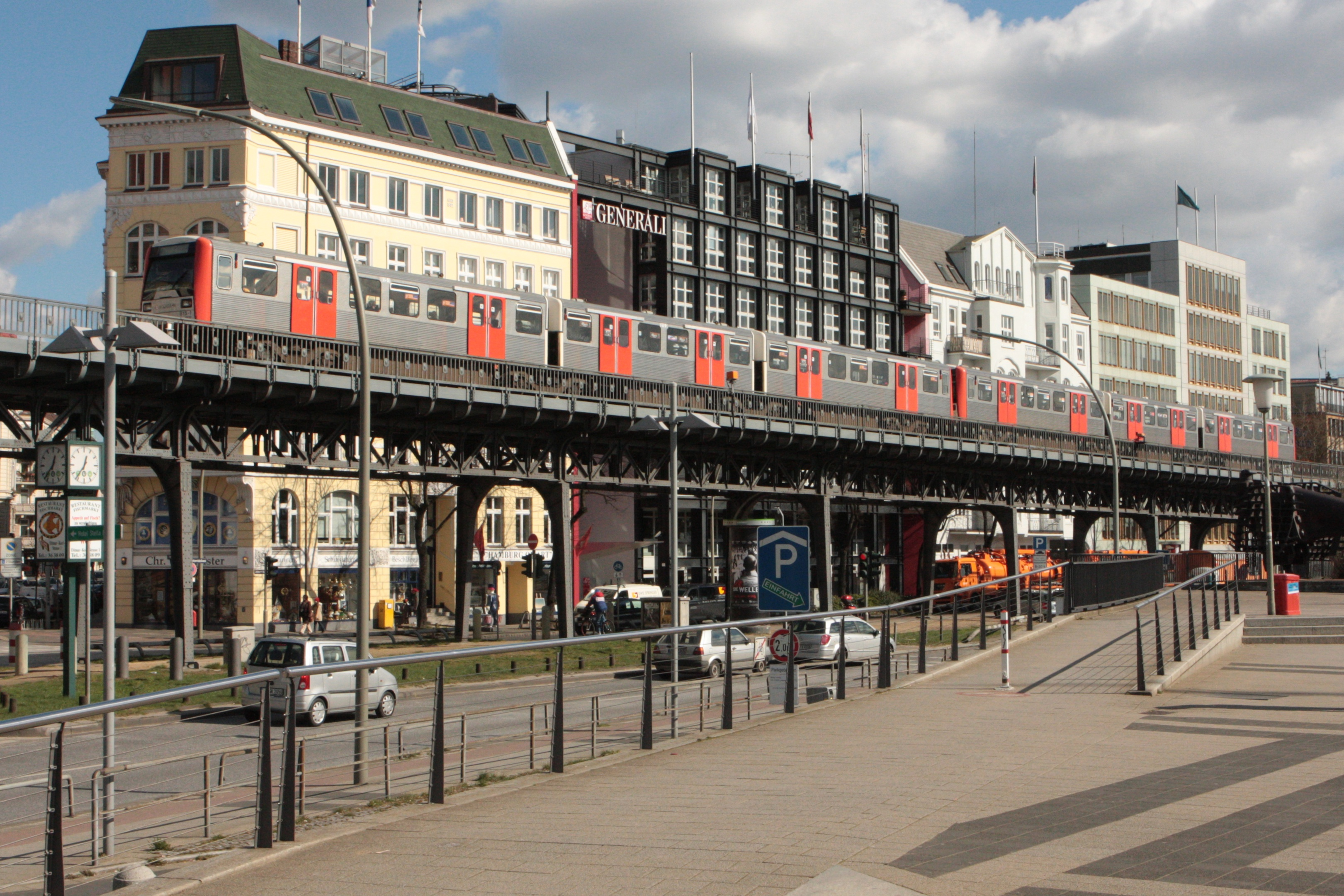 Hamburger U-Bahn am Baumwall. Dahinter das Generali-Gebäude